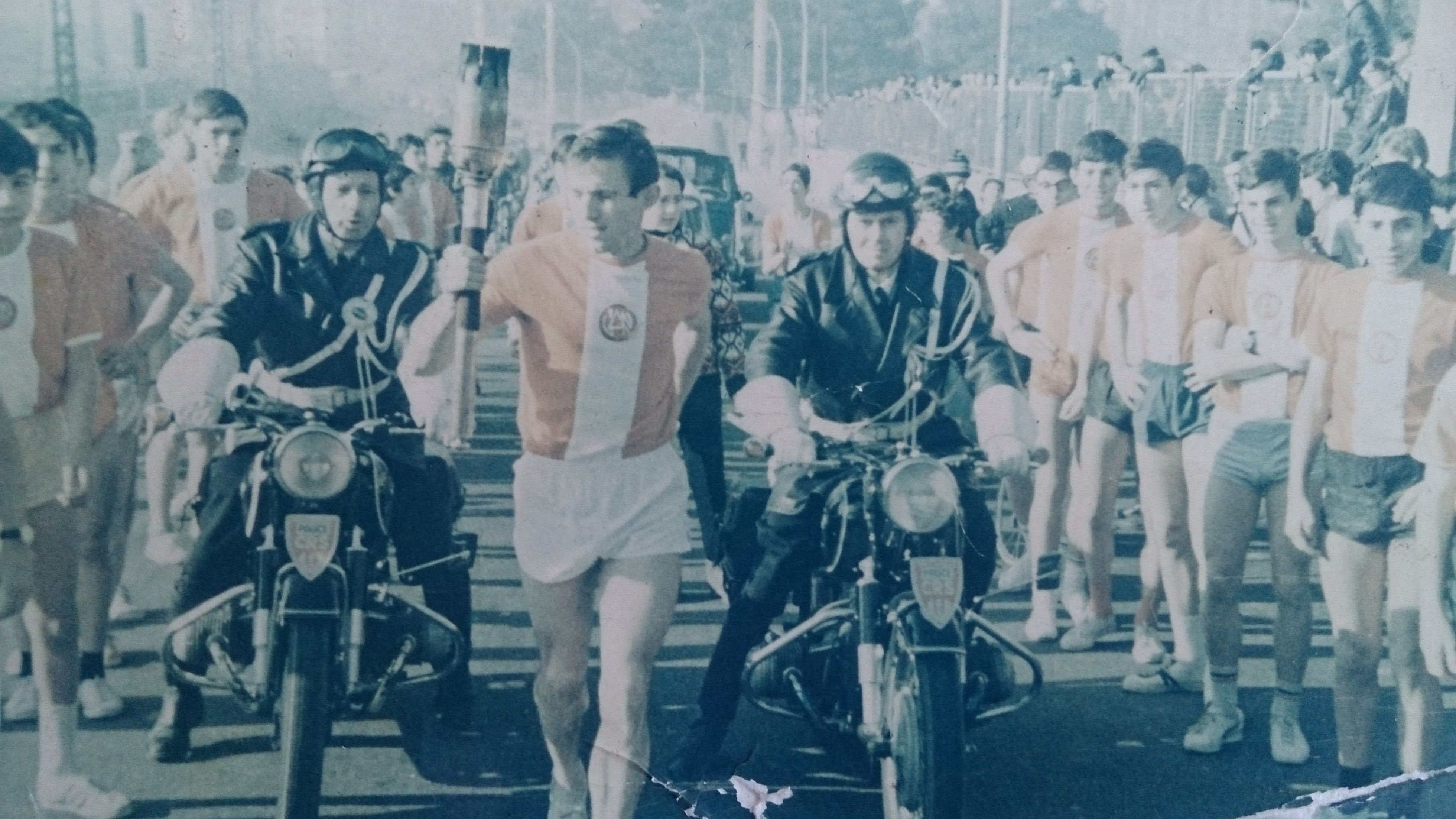 Serge Bord portant la flamme Olympique pour les JO d'hivers de Grenoble en 1968